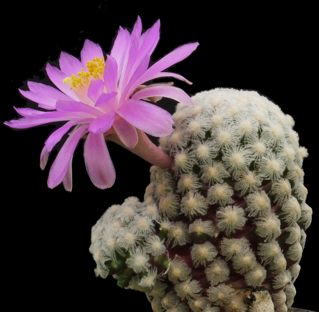 Mammillaria theresae, Coneto Pass, DGO. in Blüte.